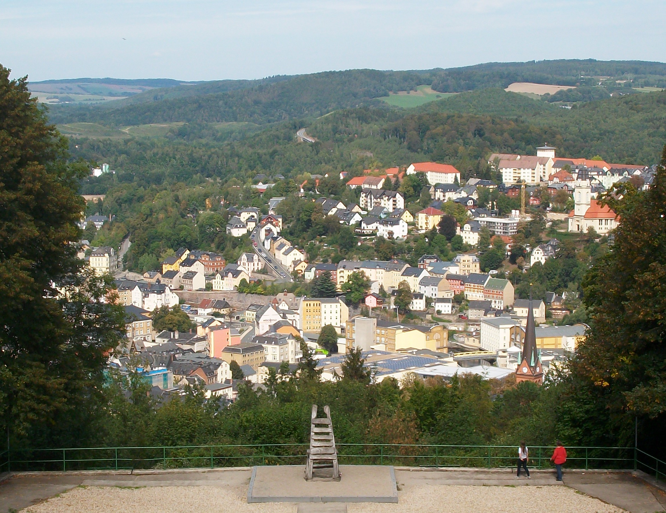 Parkwarte Heidelsberg, Blick auf den Zeller Berg